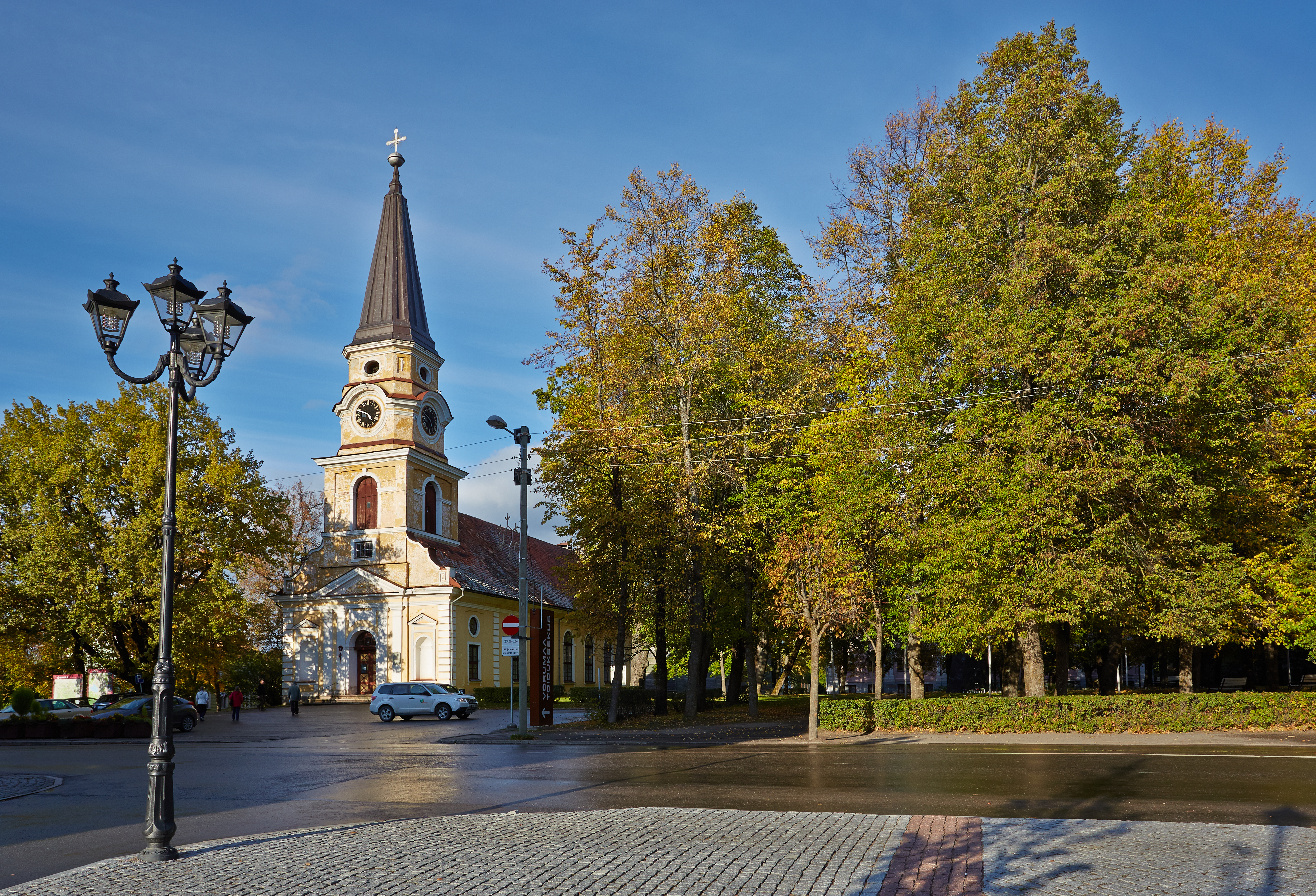 Võru Katariina kirik 2013. aasta septembris.